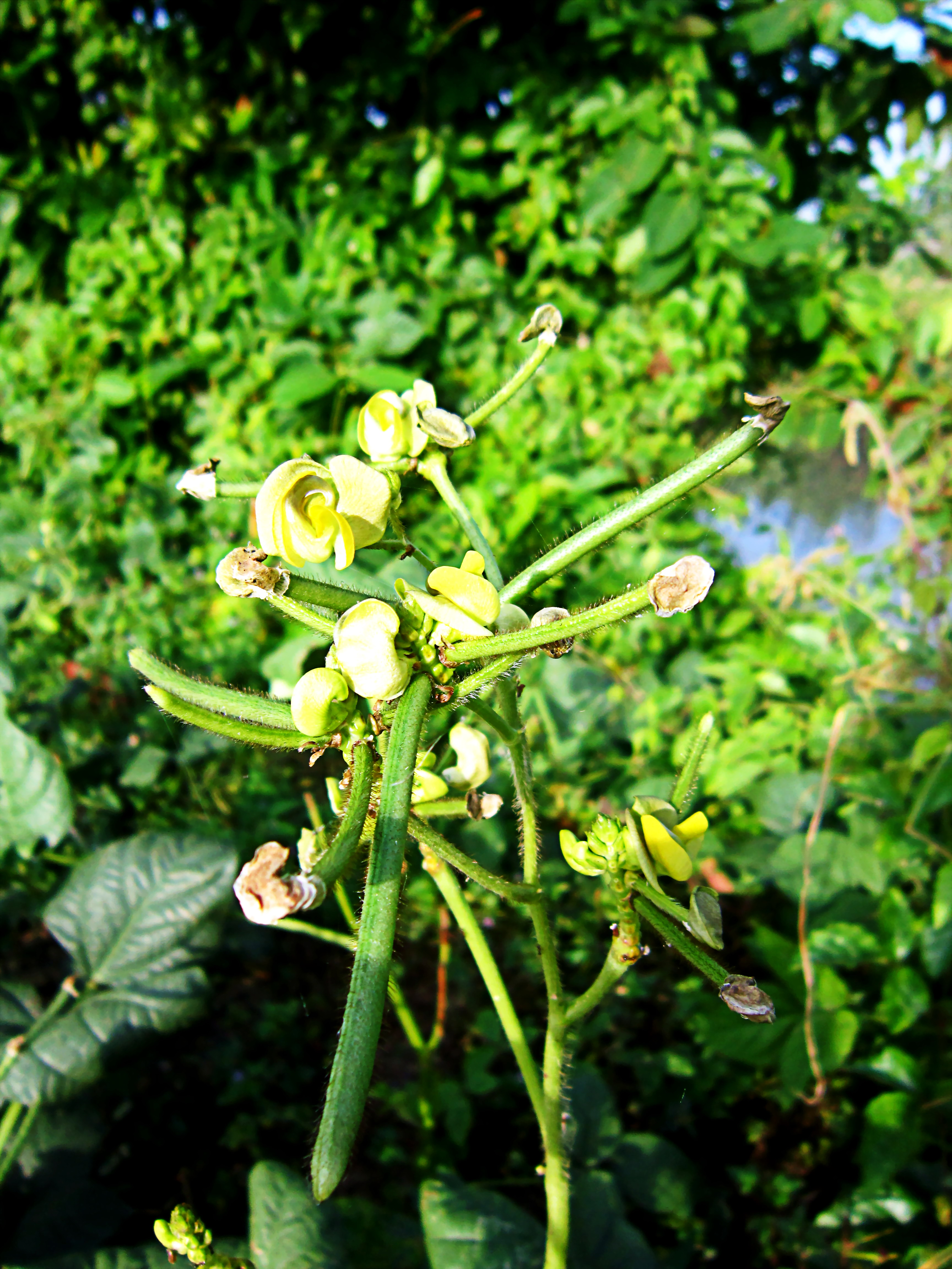 Cây đậu xanh đang trổ trái non và hoa màu vàng nhạt.